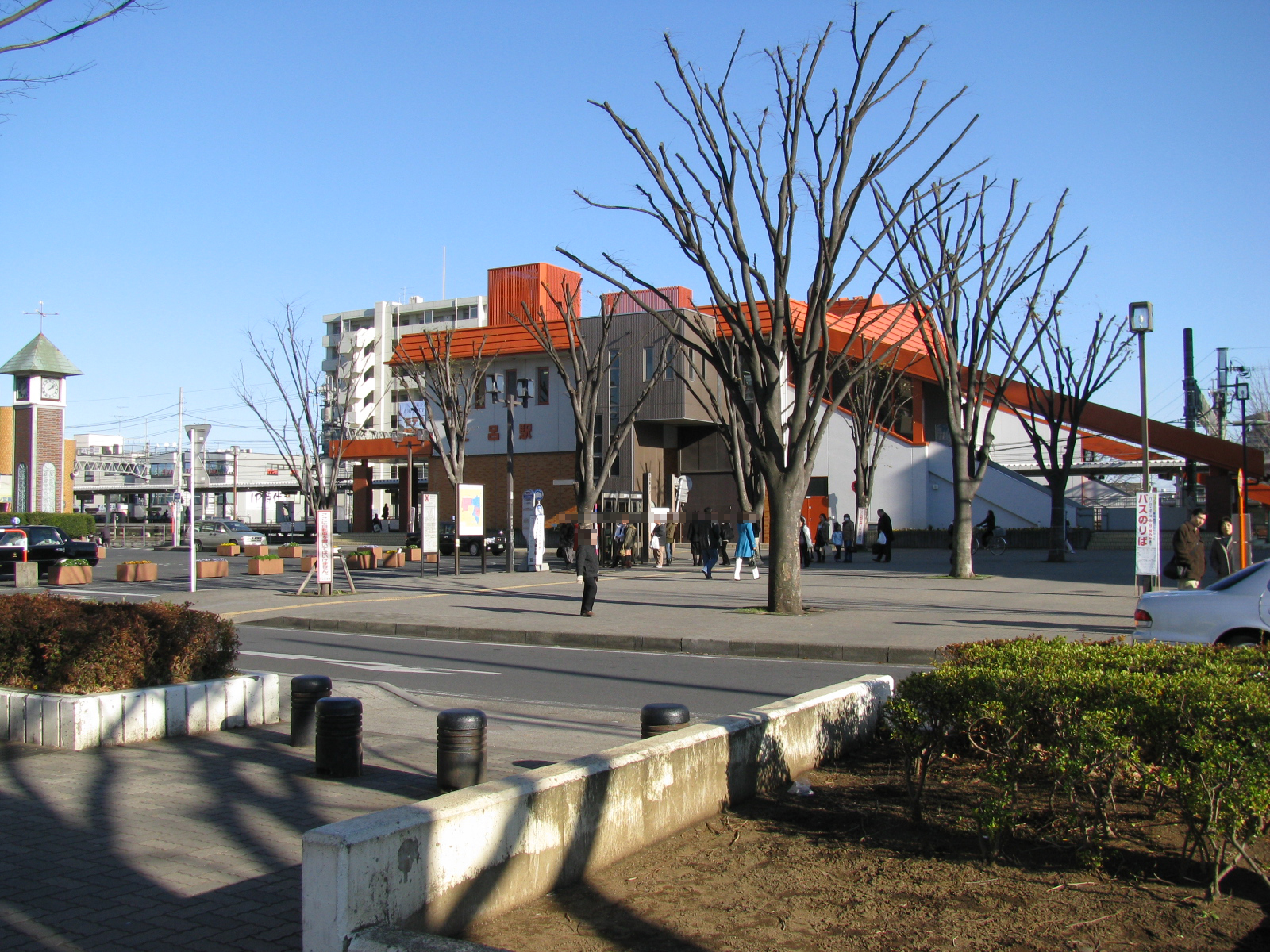 JR土呂駅